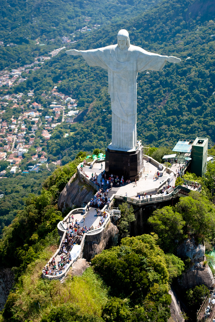 Vista aerea de São Cristóvão - Río de Janeiro - Febrero 2011